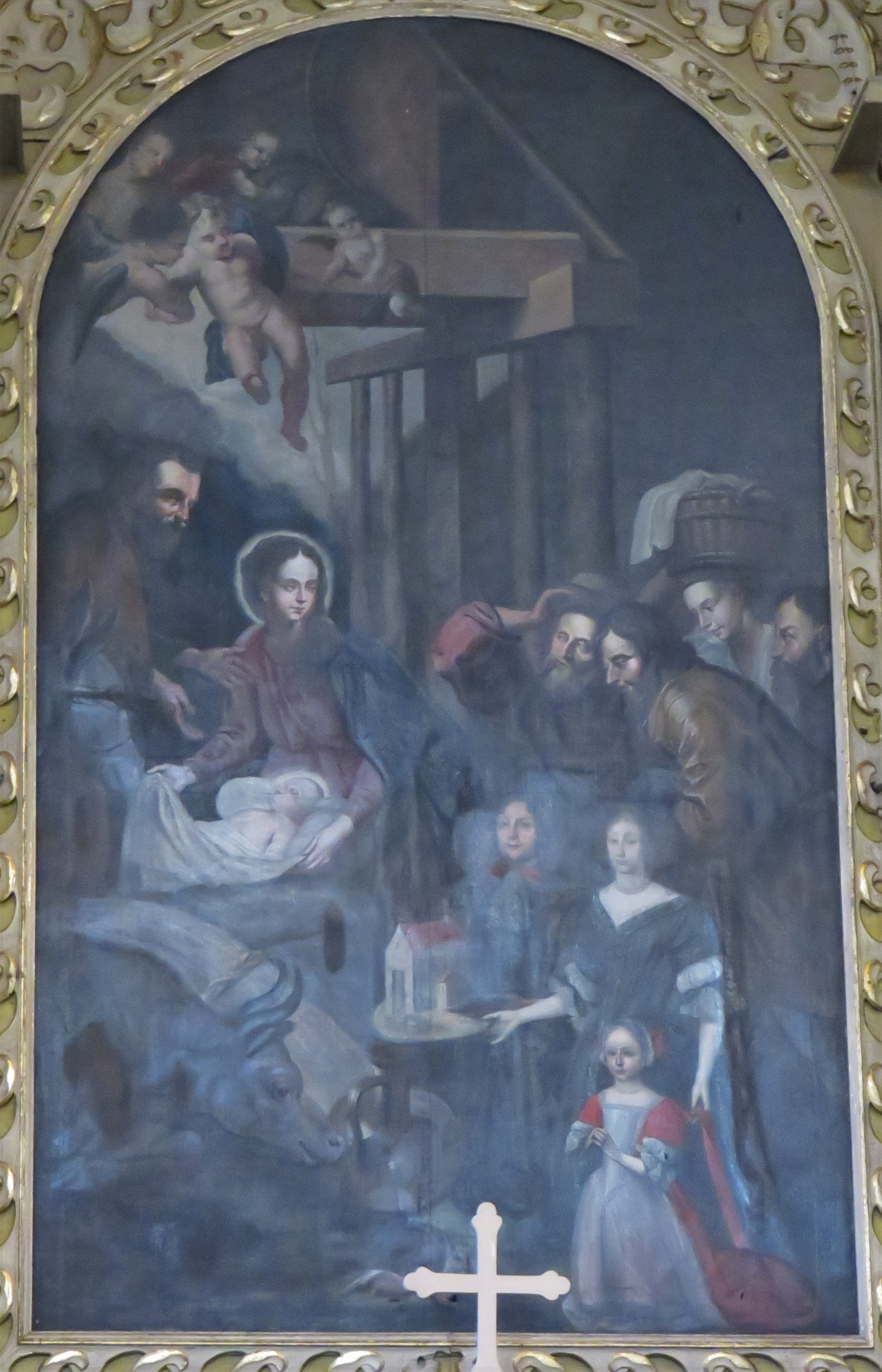 Oltářní obraz v opočenském kostele Narození Páně zobrazující narození Krista. Vpravo dole je portrét zakladatele Ludvíka Colloredo z Waldsee, vedle něj jsou zobrazeny jeho manželka Marie Eleonora Sinzedorfová a jediná dcera Marie Antonie.